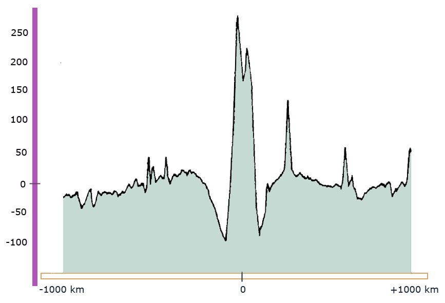 Grav. Anom.